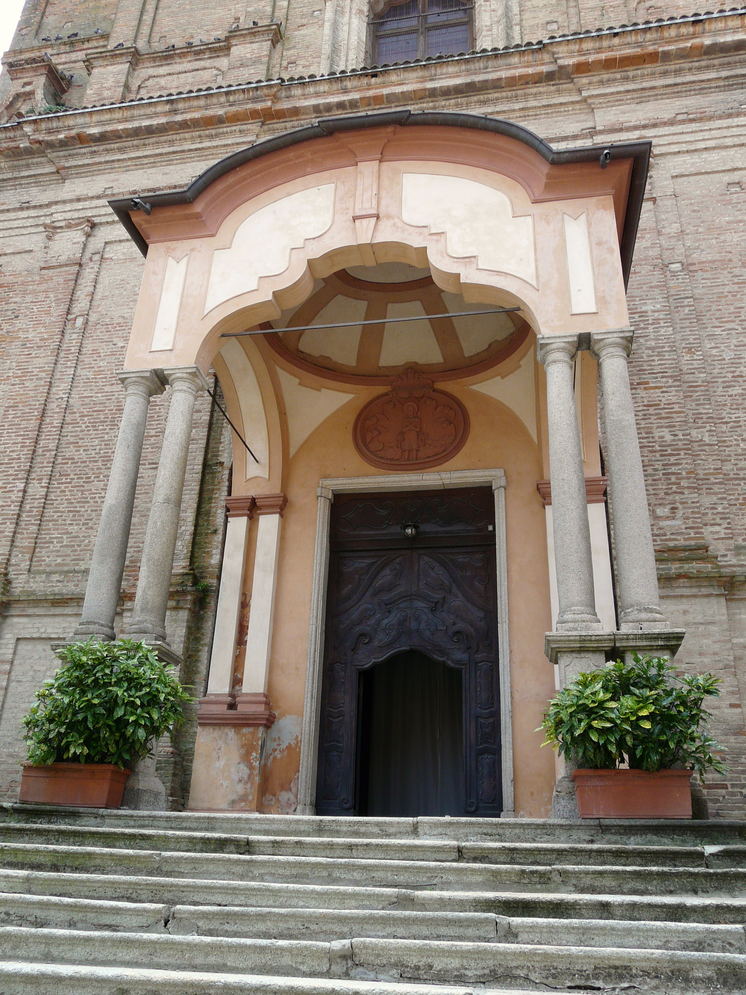 Chiesa di Santa Maria e di San Remigio, Pecetto di Valenza, Piemonte, Italia